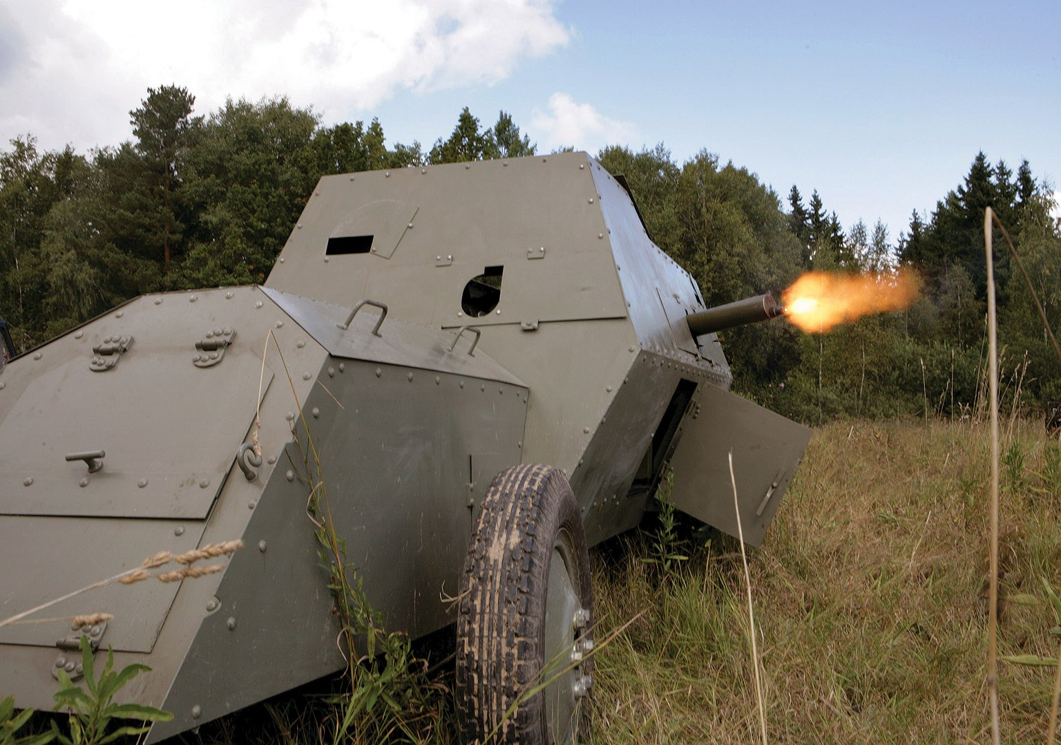 Полноразмерная копия русского бронеавтомобиля «Руссо-Балт тип С» принимает участие в мероприятии военно-исторической реконструкции